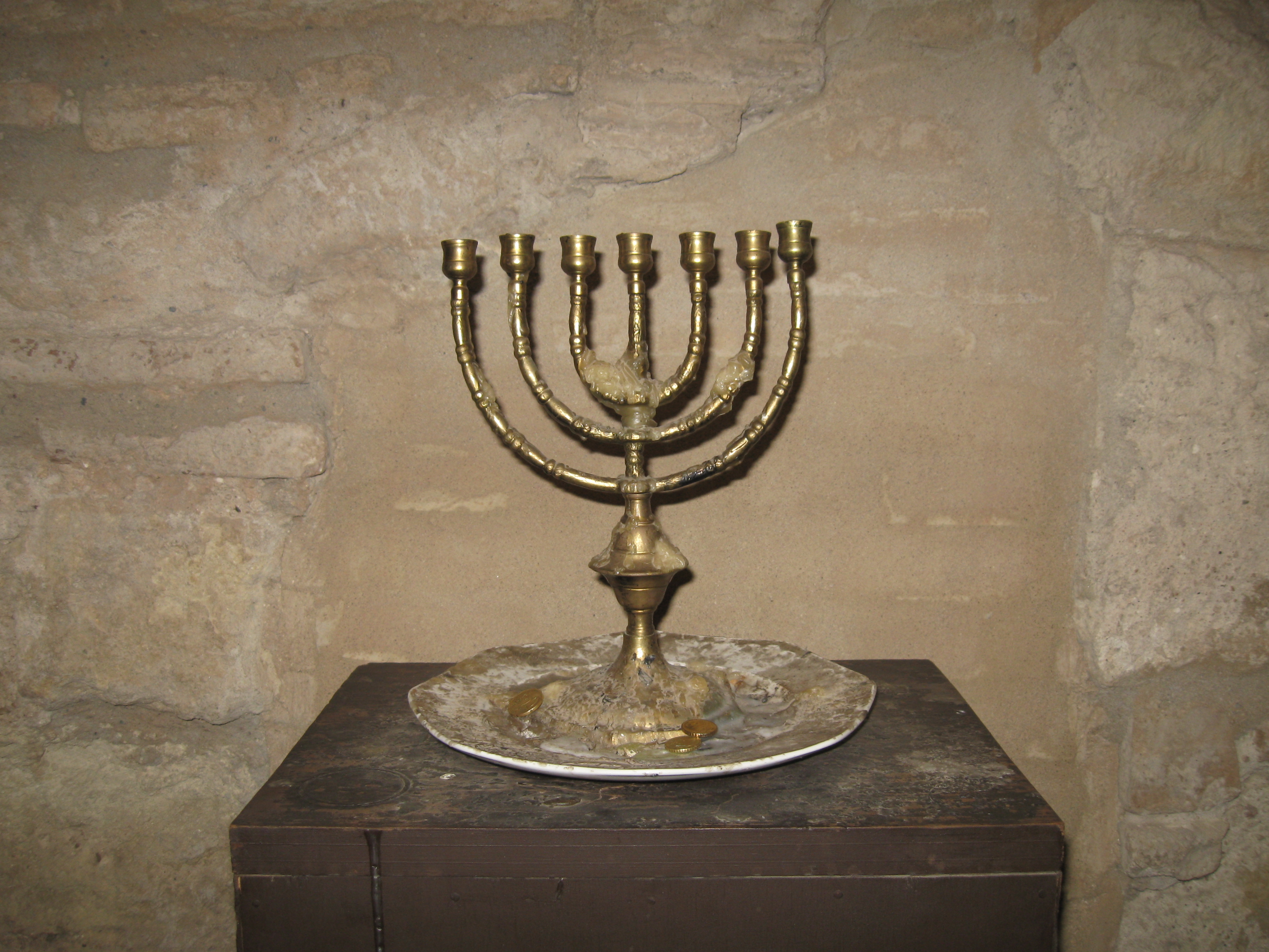 Menorá en la Sinagoga de Córdoba (España).